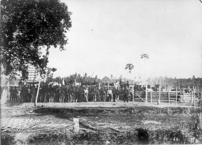 Foto. Militaire expeditie op Lombok in 1894. Groep militairen onder leiding van overste Schener met kanonnen voor verdedigingswerk Pagassangan Oost